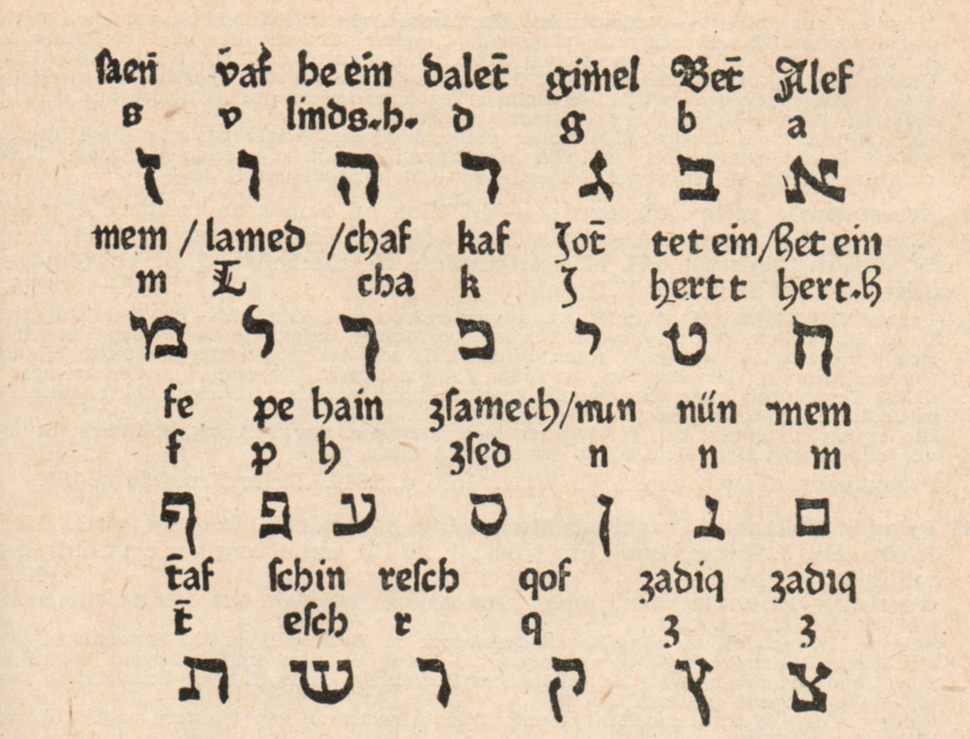 Ausschnitt aus Petrus Nigers Stern des Meschiah